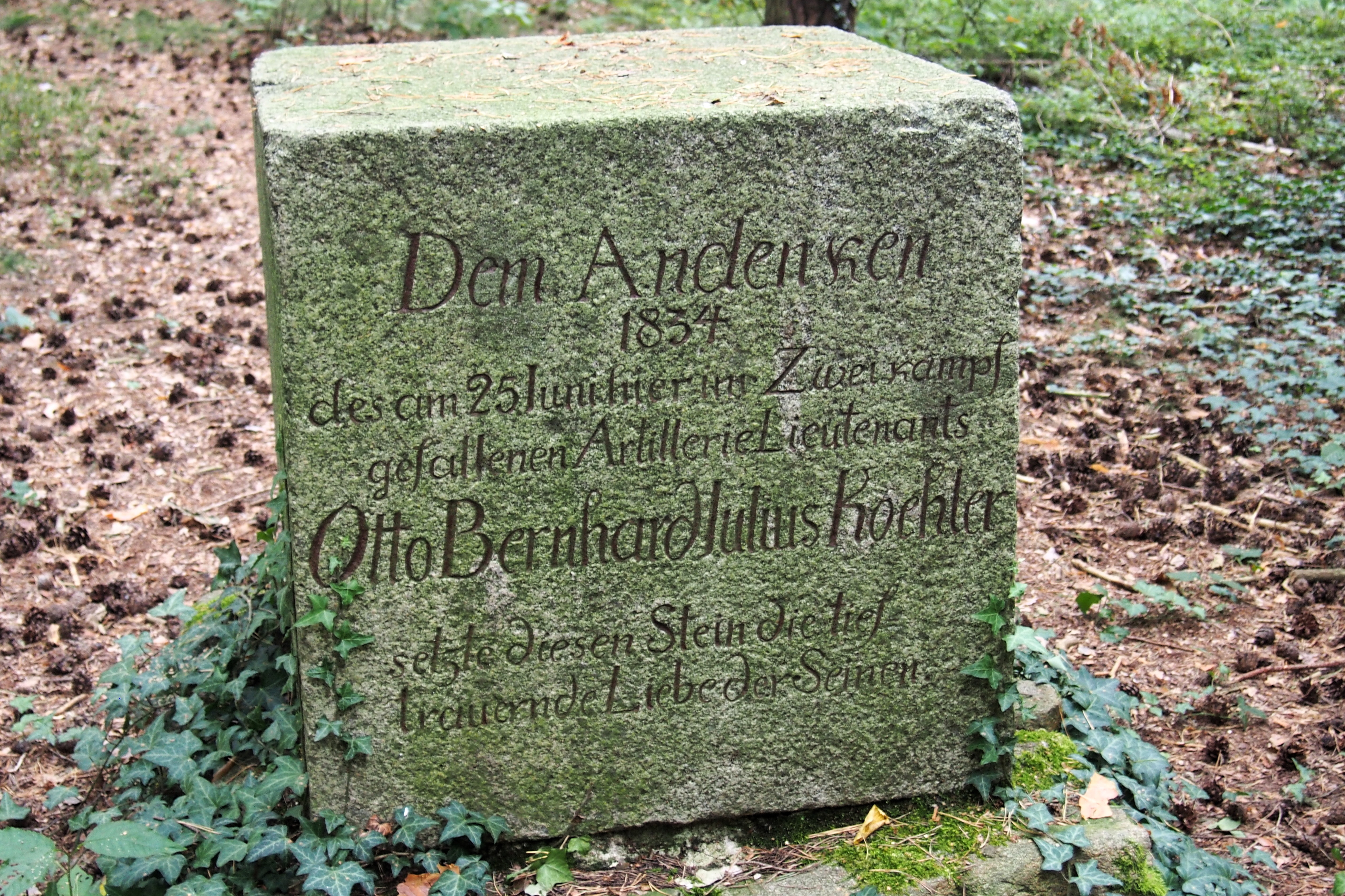 Denkmalgeschützter Duellstein an der Flurgrenze zu Grünberg und Schönborn im Dresdner Ortsteil Langebrück